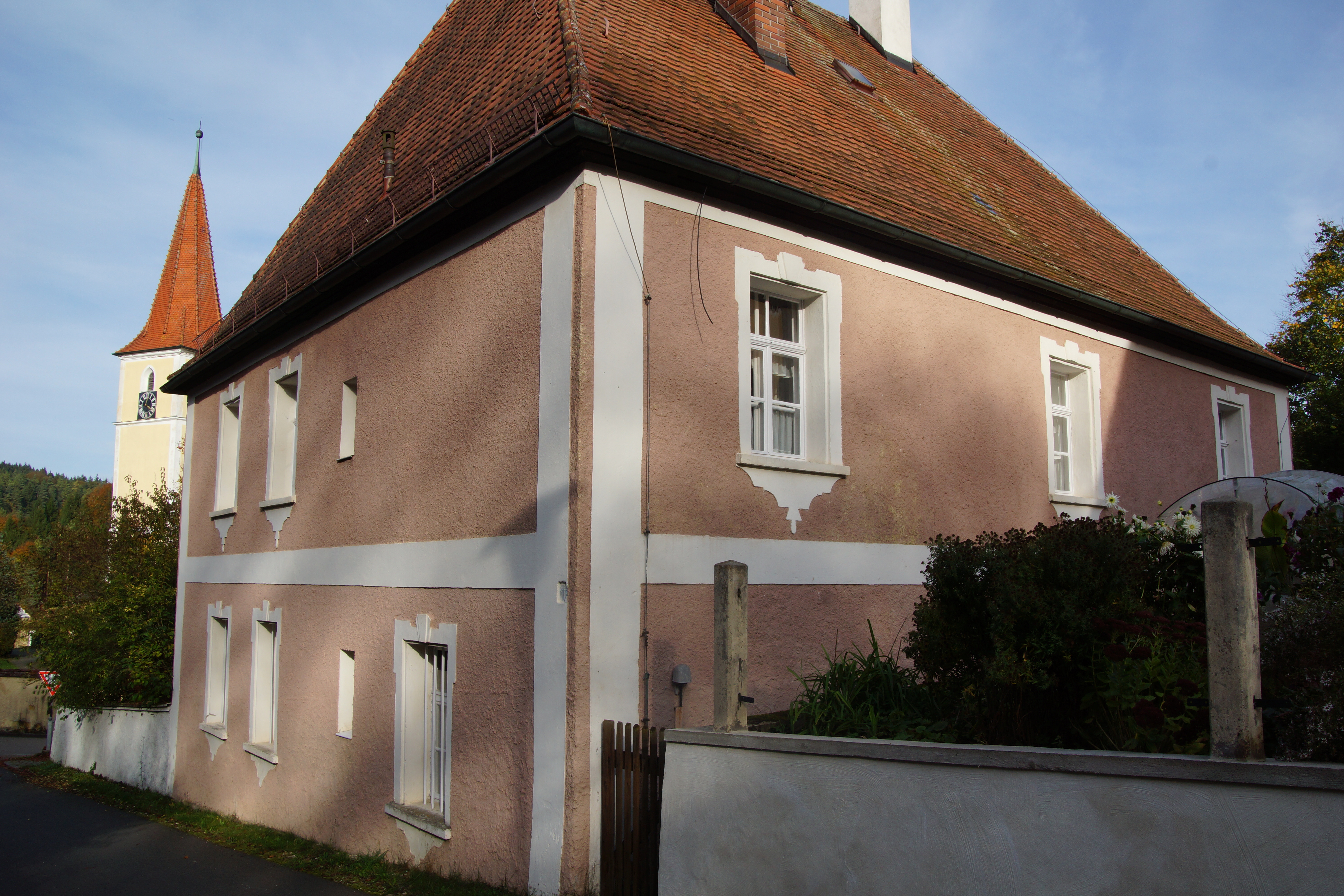 Das Pfarrdorf Fürnried in der Oberpfälzer Gemeinde Birgland